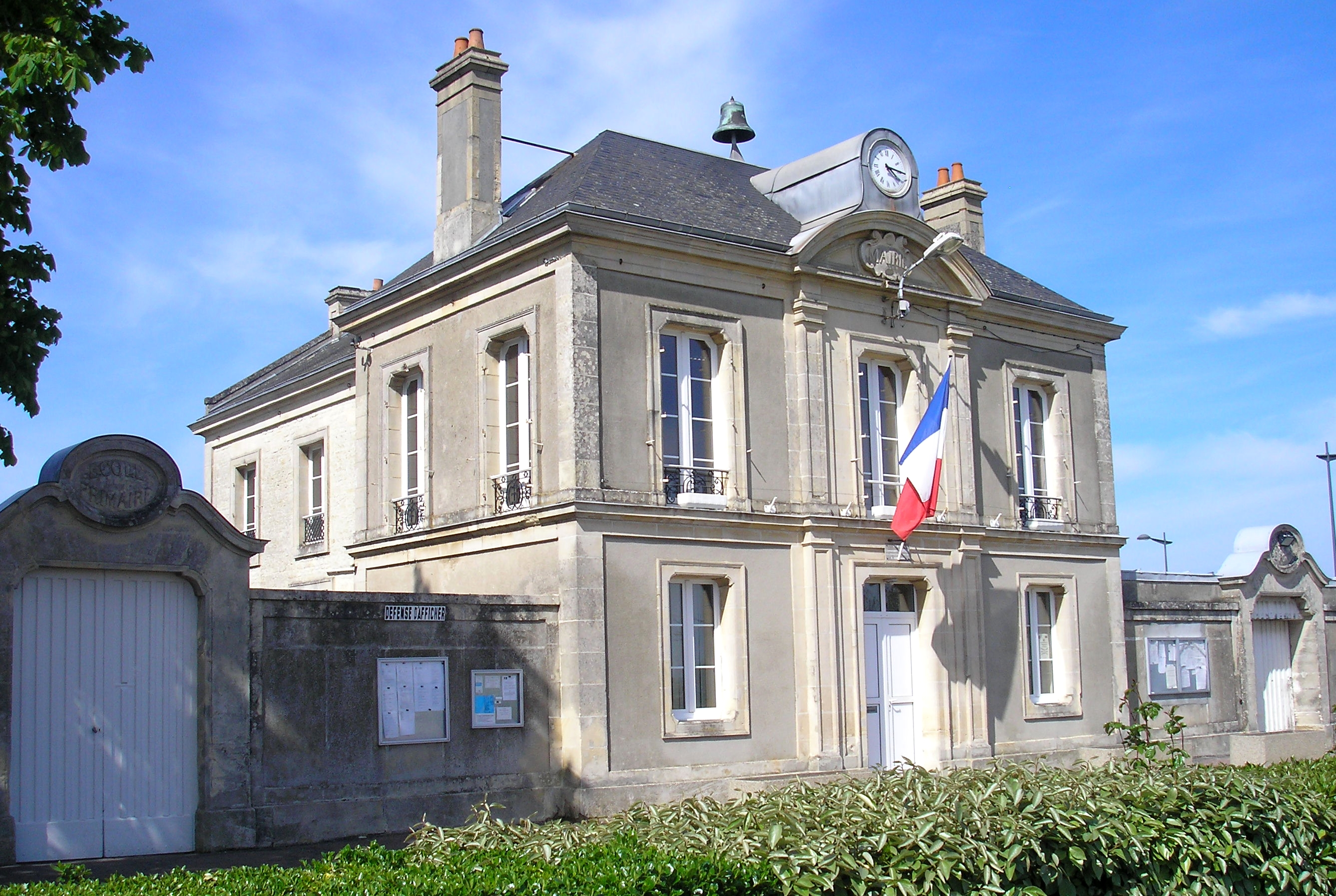 Amfreville (Normandie, France). La mairie.